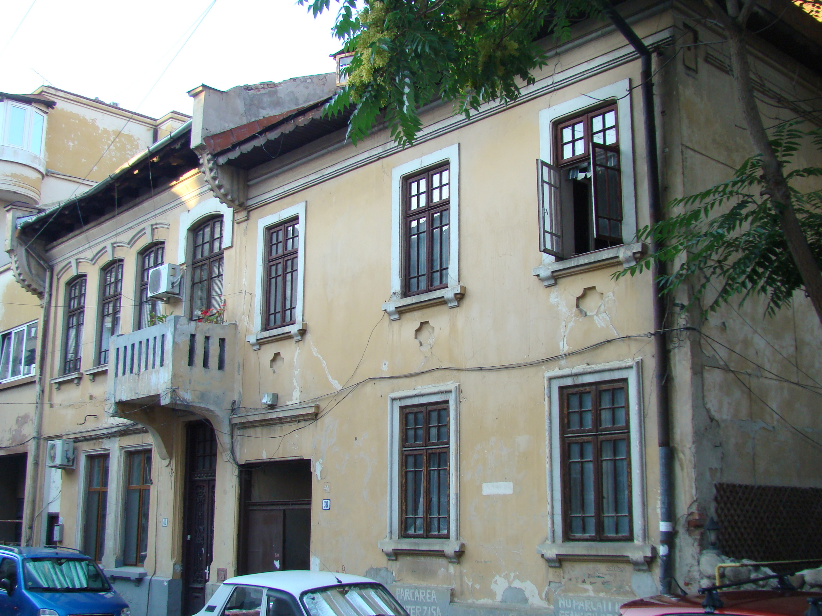 Casă monument istoric, str. Theodor Aman, nr.38